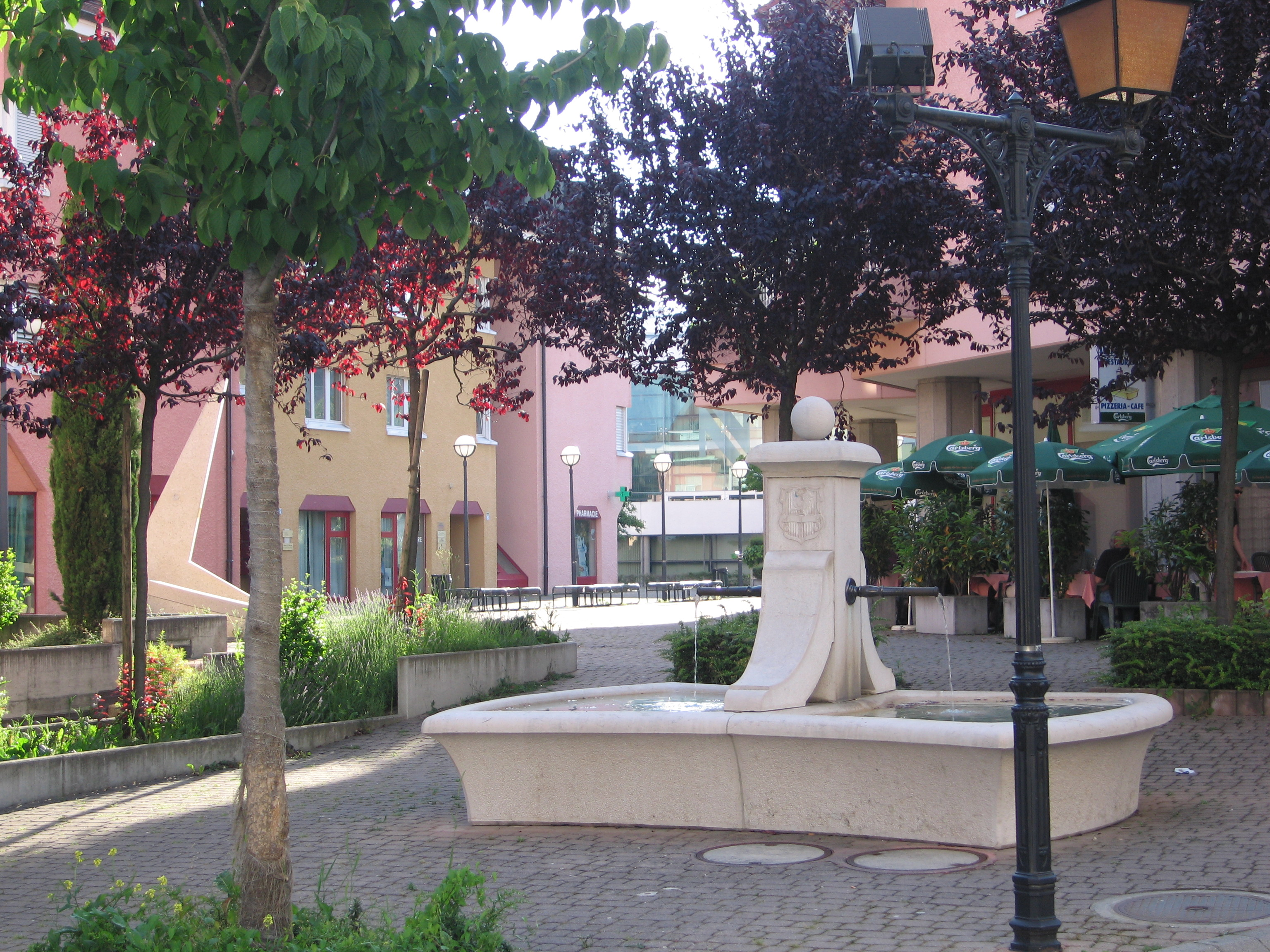 Batiments communaux de Paudex